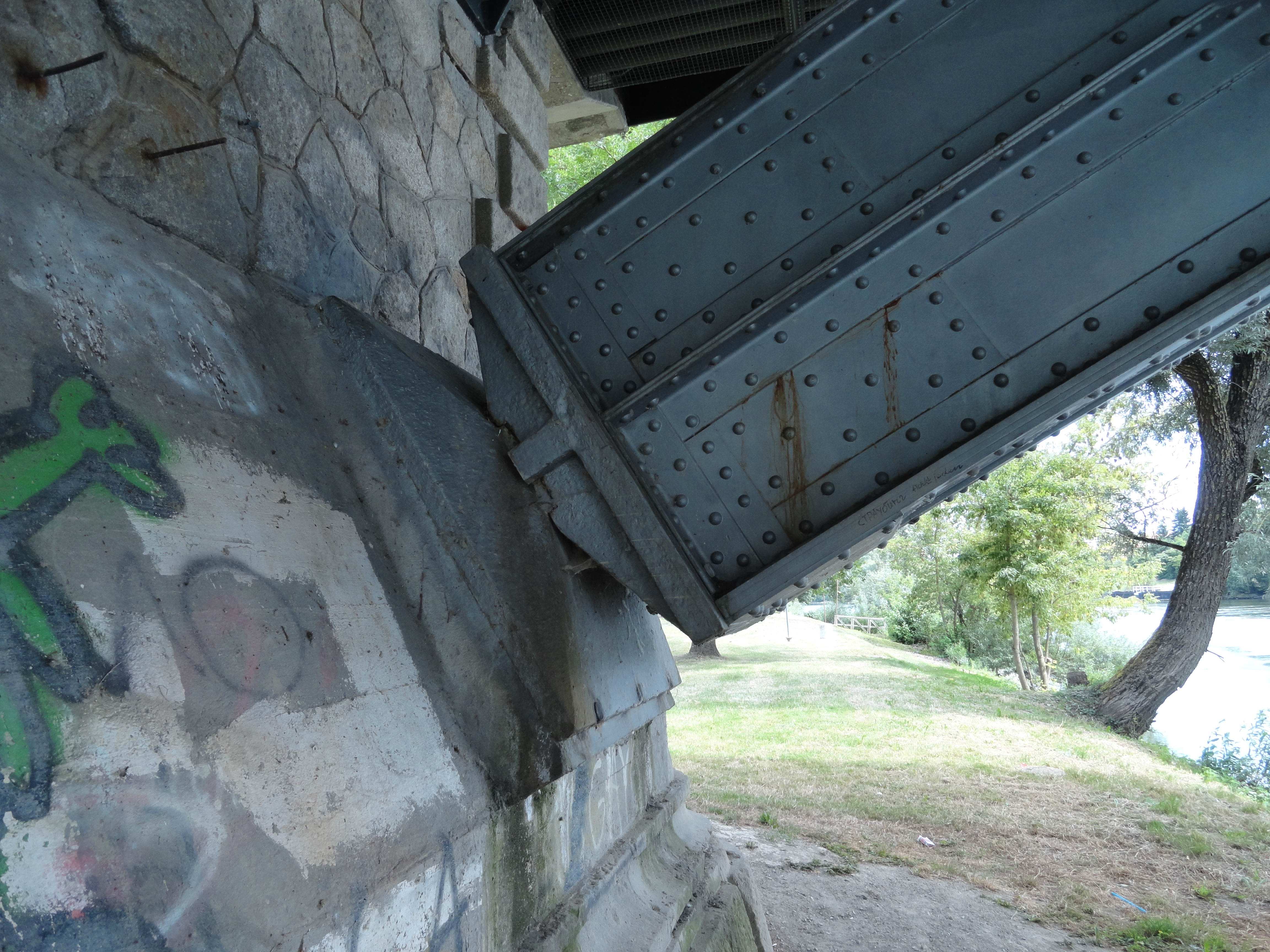 nördliches Lager des östlichen Bogens der Schlossbruecke Straubing